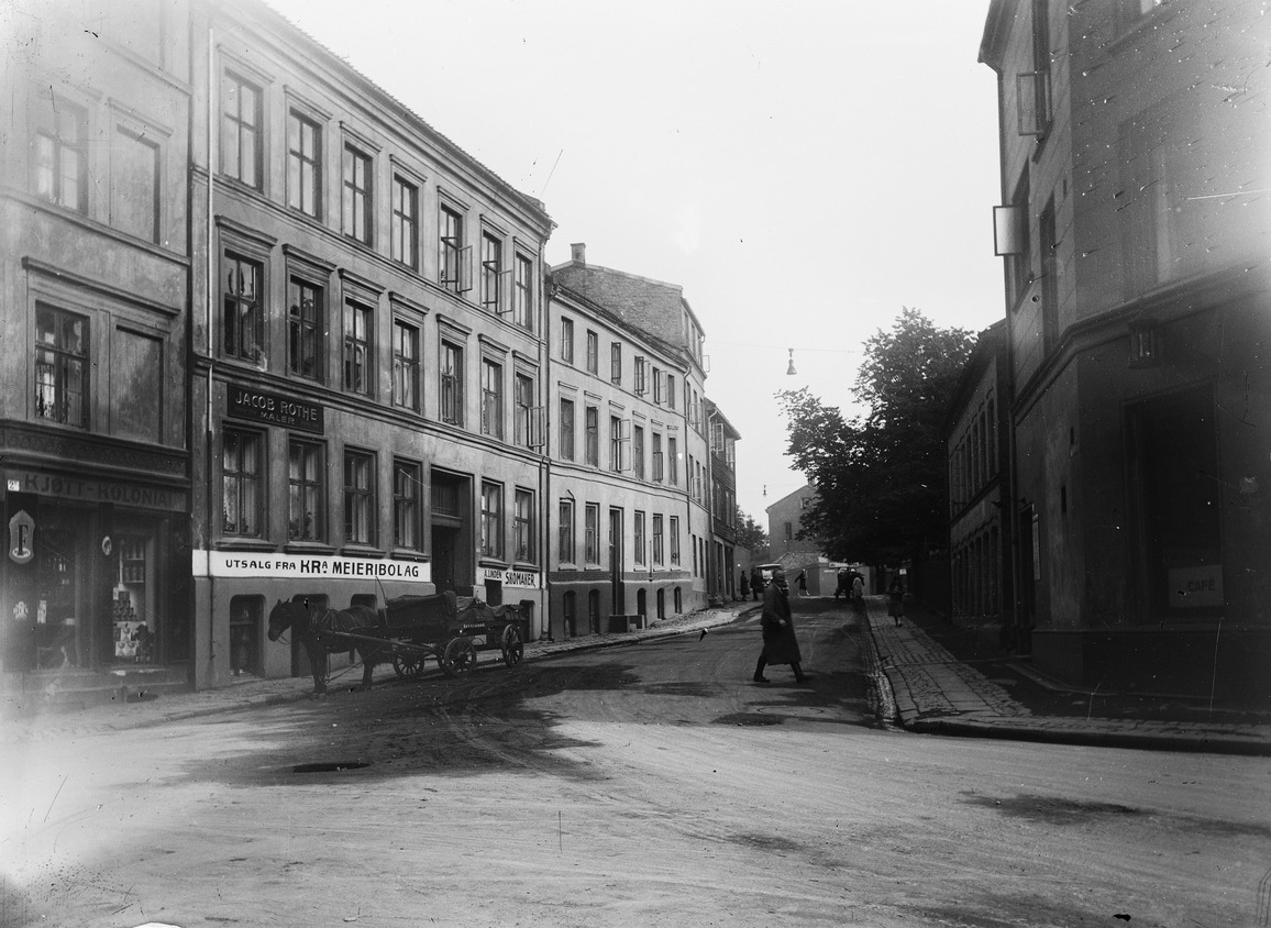 Filosofgangen sett fra Bakkegaden